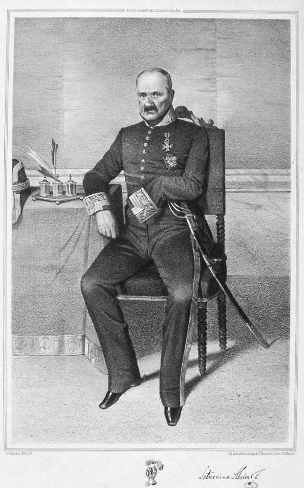 Retrato de Saturnino Abuin. Litografía de Domingo Valdivieso y Henarejos. Biblioteca Nacional de España.